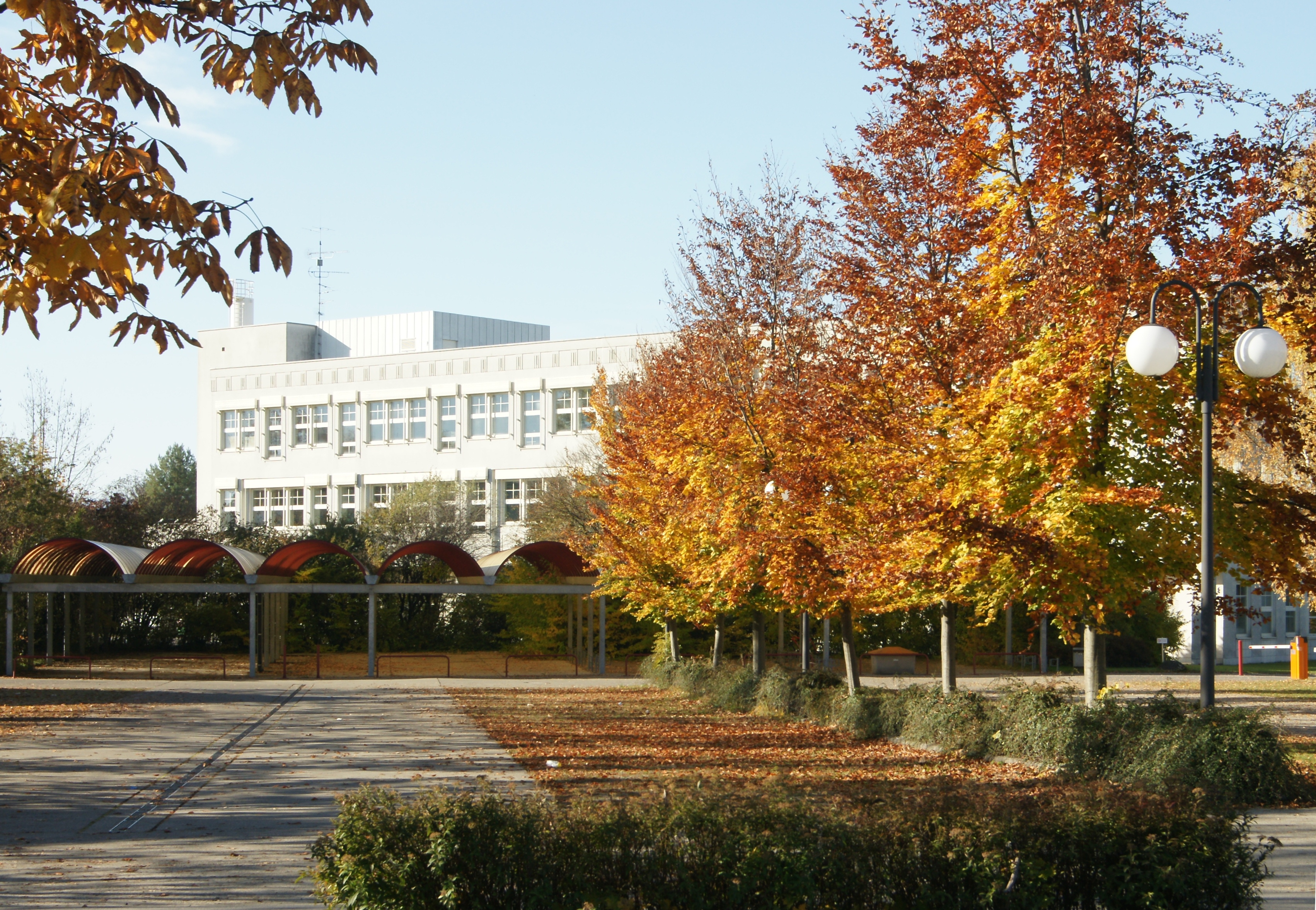 HTL Dornbirn und Universitätsinstitut für Textilchemie und Textilphysik im Stadtteil Schoren